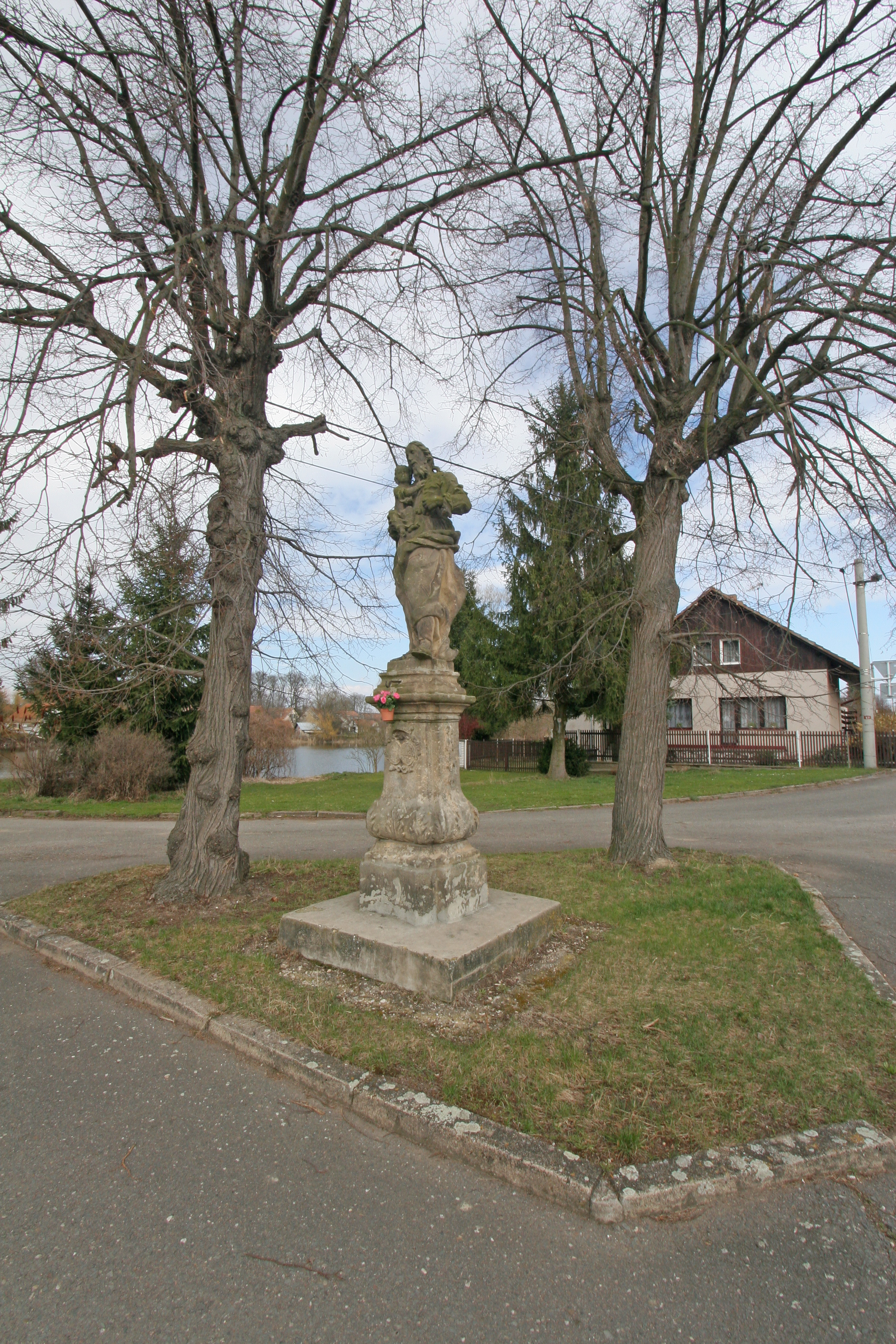 Barchov socha sv. Josefa